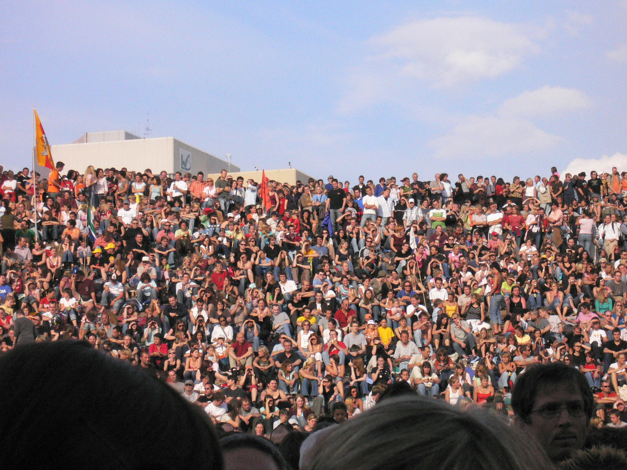 Das Fest-Festival in Karlsruhe